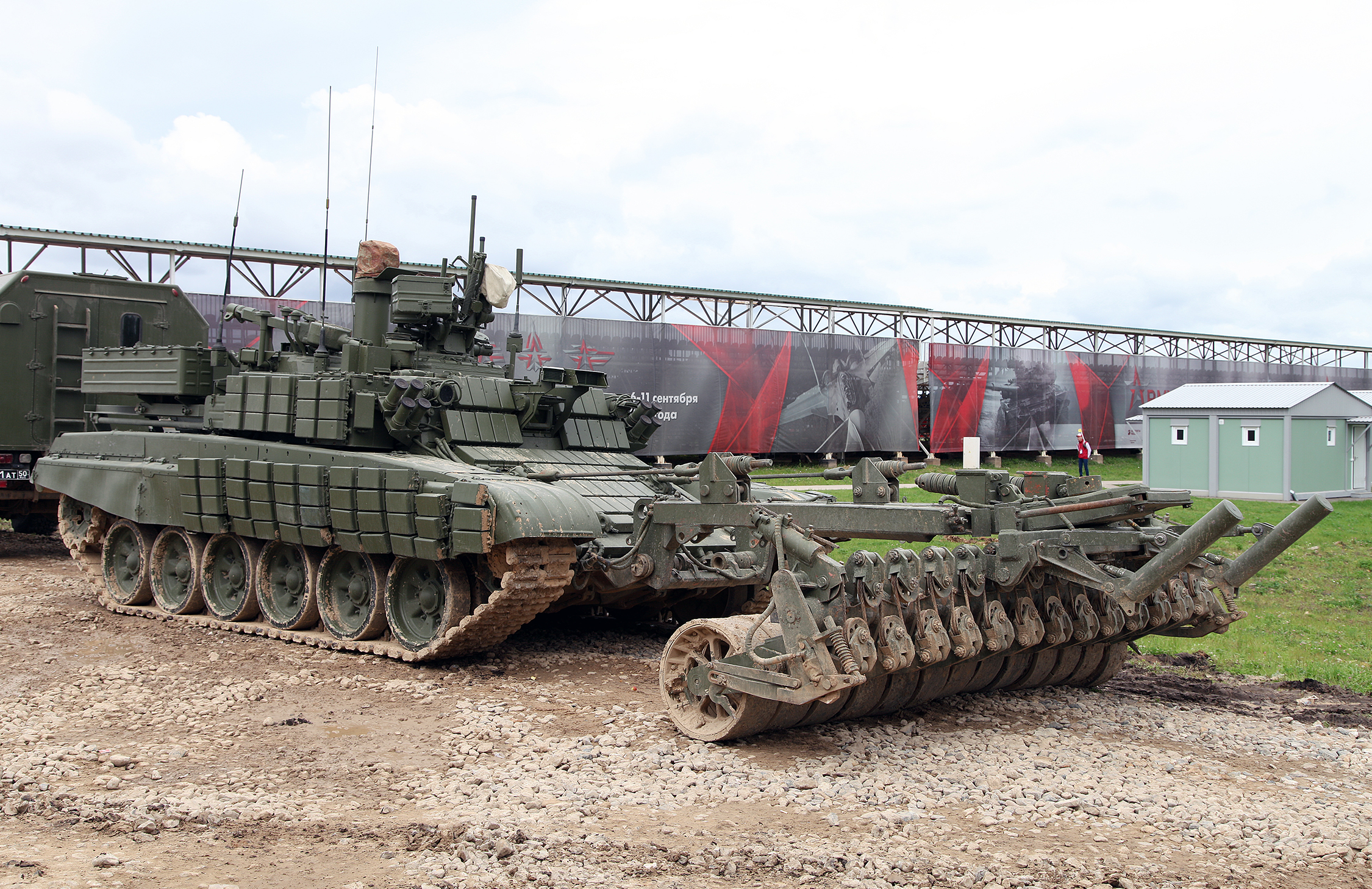 Робототехнический комплекс разминирования Проход-1 (Prokhod-1 mine clearing unmanned ground vehicle)